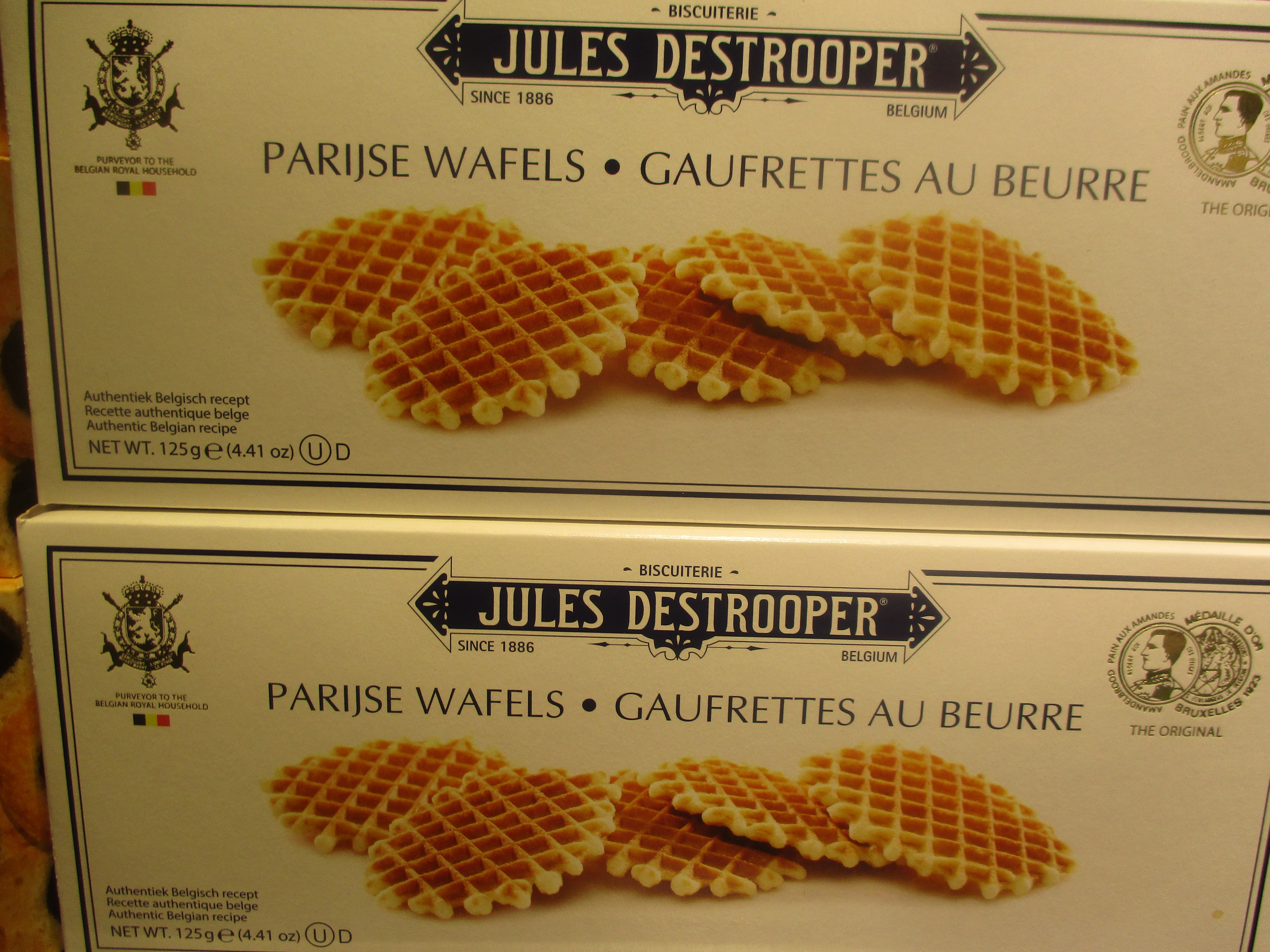 Gaufrettes au beurre de chez Jules Destrooper, Parijse wafels.